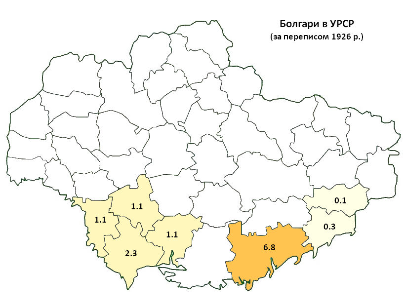 Розселення болгар в УРСР за даними перепису 1926 р. / Bulgarians in Ukrainian SSR according to 1926 census